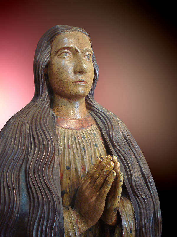 Nossa Senhora da Conceição, século XVIII, arte missioneira do acervo do Museu Júlio de Castilhos, Porto Alegre, Brasil.